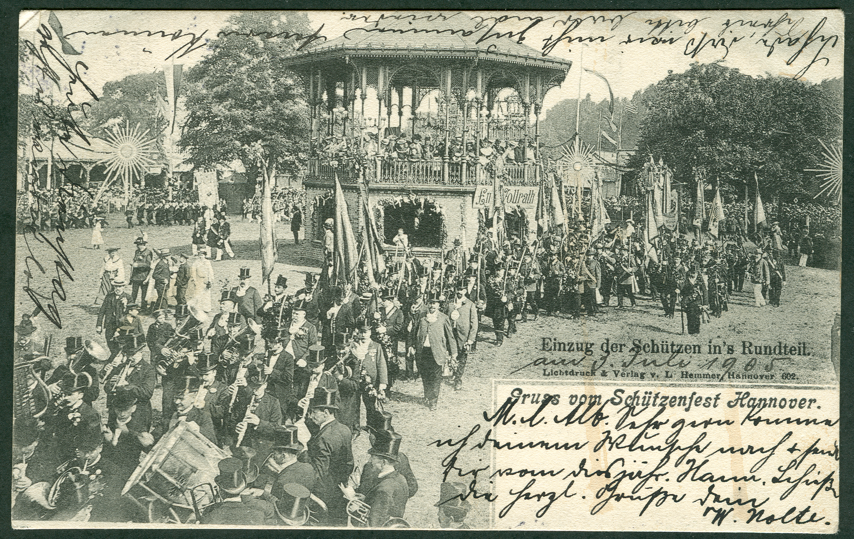 Diese Ansichtskarte von Ludwig Hemmer mit der laufenden Nummer 602 zeigt eine Menschenmenge - niemand ohne Kopfbedeckung - und ein Orchester beim "Einzug der Schützen in's Rundteil" auf dem alten Schützenplatz in Hannover. Das "Rundteil" trägt eine Werbetafel von "Emil Vollrath": Der seinerzeit größte Wurst- und Fleischwarenfabrikant in Hannover mußte wohl kaum noch auf seine im "Rundteil" angebotenen Produkte hinweisen - ein einfacher Hinweis auf den bekannten "Guten Namen" war wohl Werbung genug.